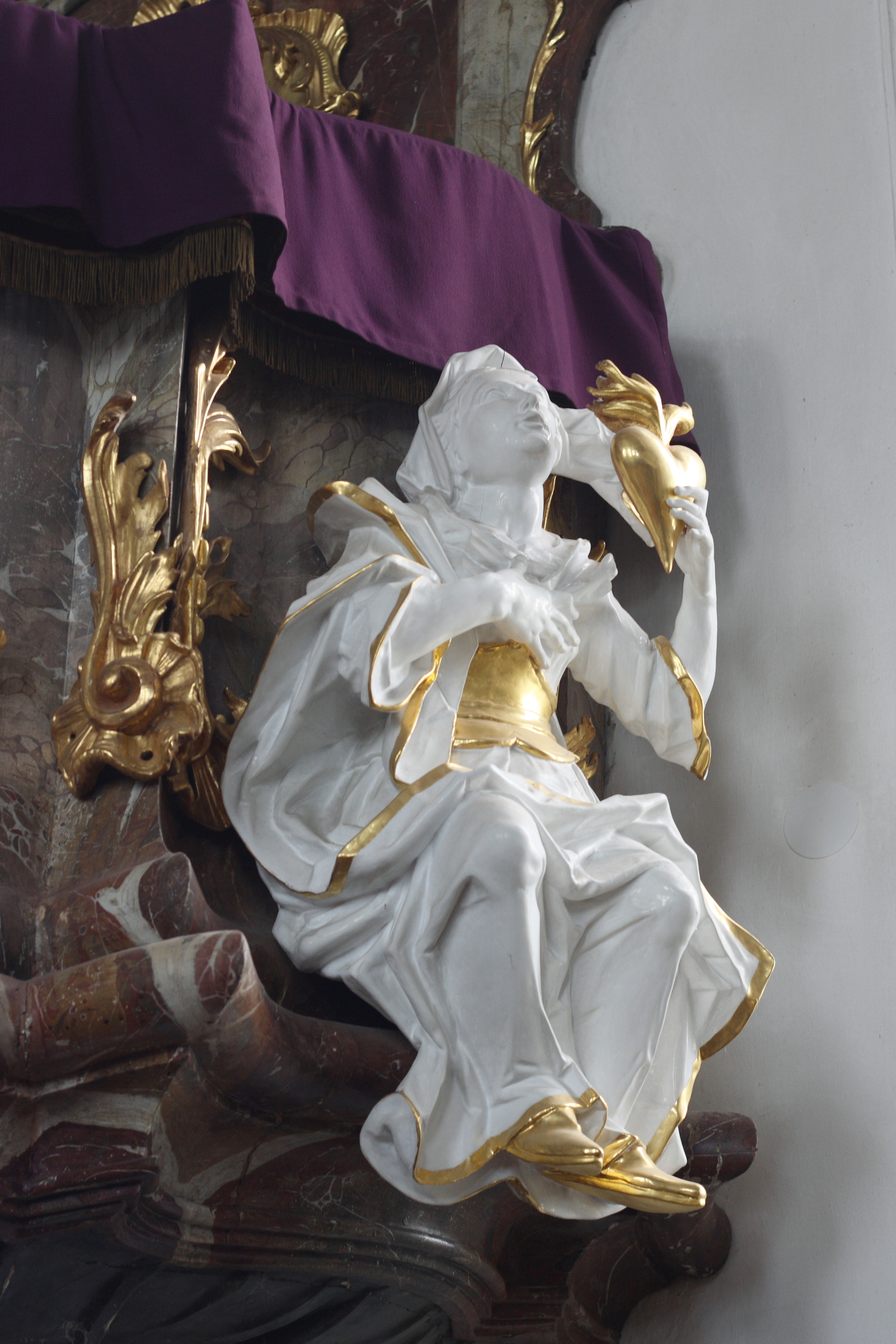 Katholische Pfarrkirche St. Nikolaus in Oberndorf am Lech, einer Gemeinde im Landkreis Donau-Ries (Bayern), Skulptur am Kanzelkorpus (um 1776); Darstellung: Allegorie der Liebe (Herz)